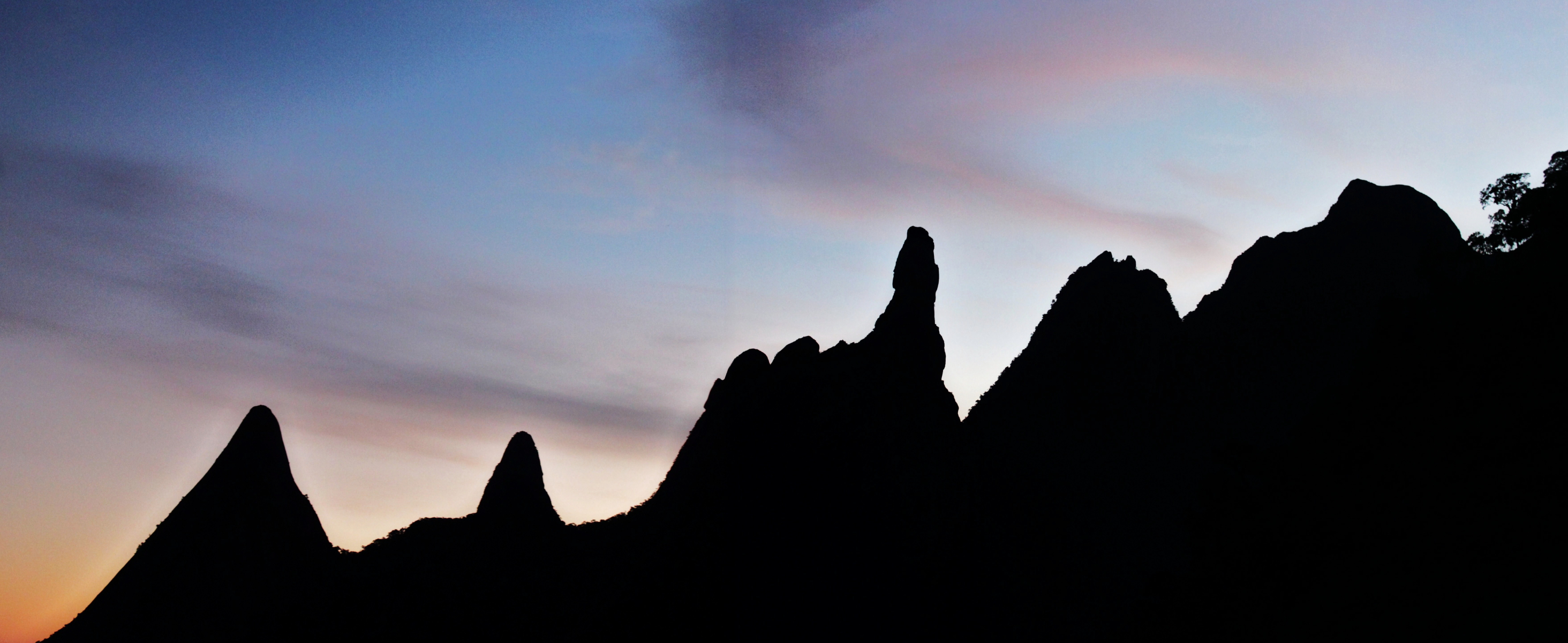 Foto dos principais picos que compõe o Parque Nacional da Serra dos Órgãos no Estado do Rio de Janeiro.